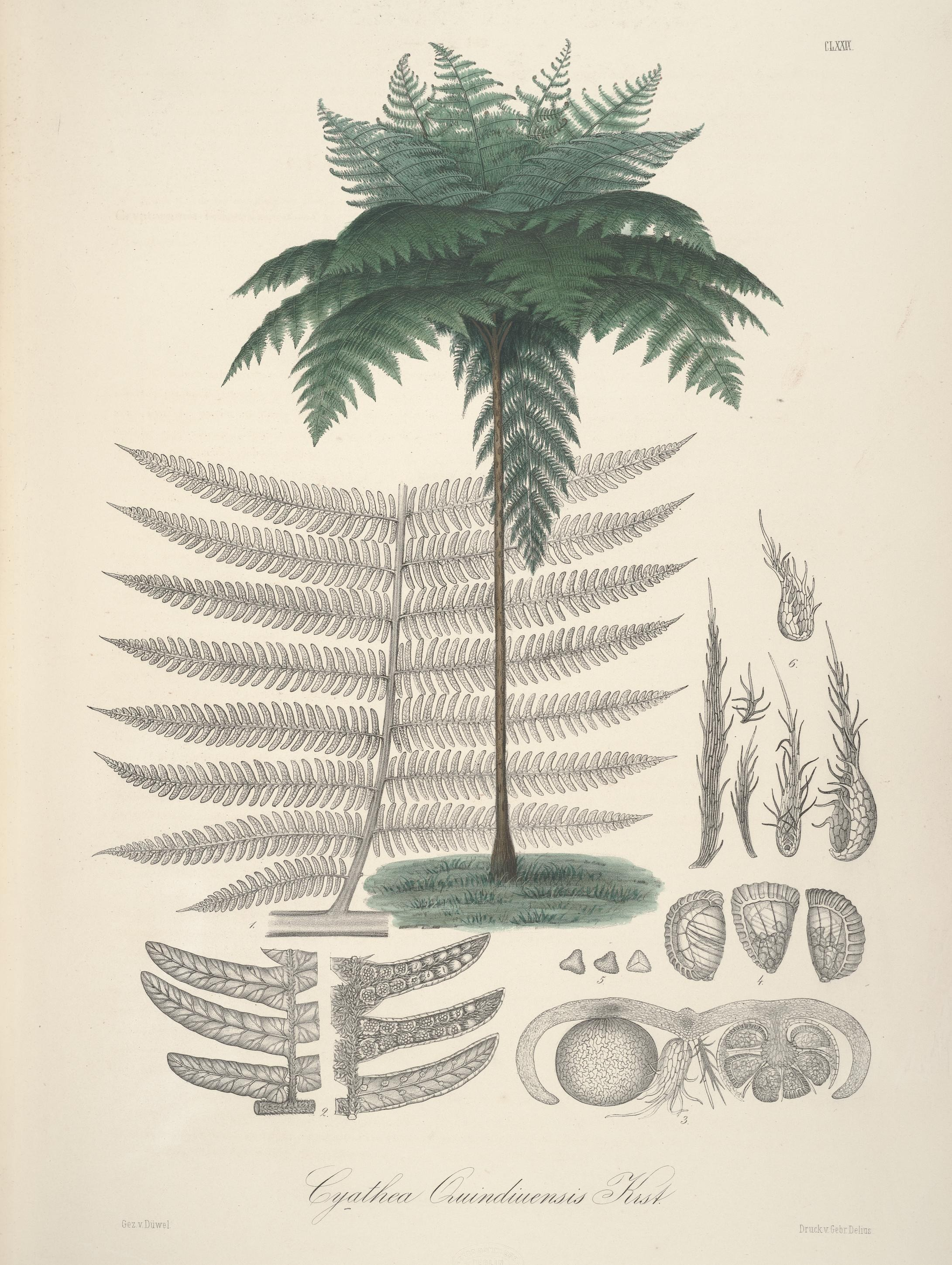 Cyathea quindiuensis / Gez. v. Düwel. / Druck Gebr. Delius